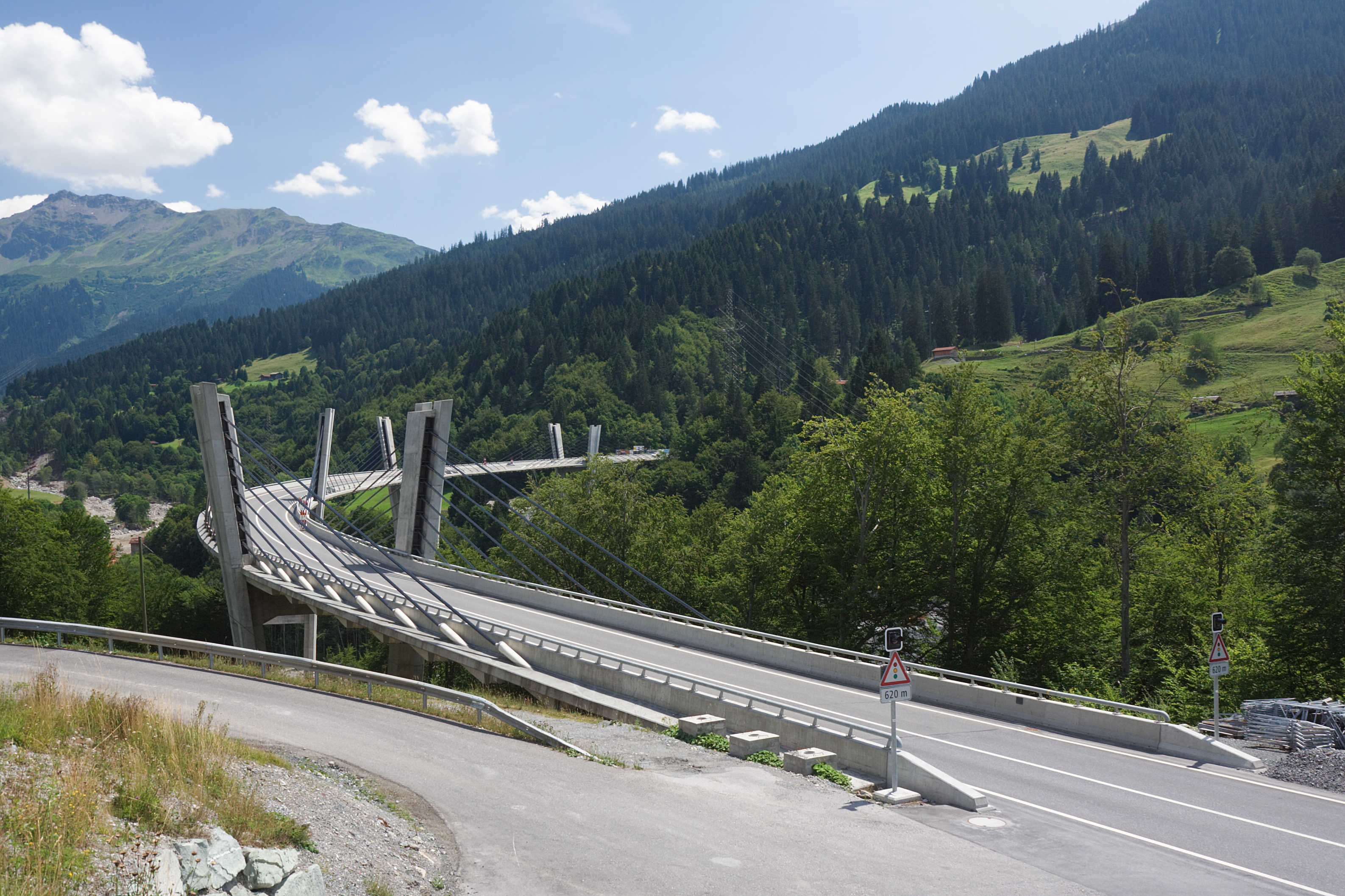 Sunnibergbrücke bei Klosters-Serneus, Schweiz